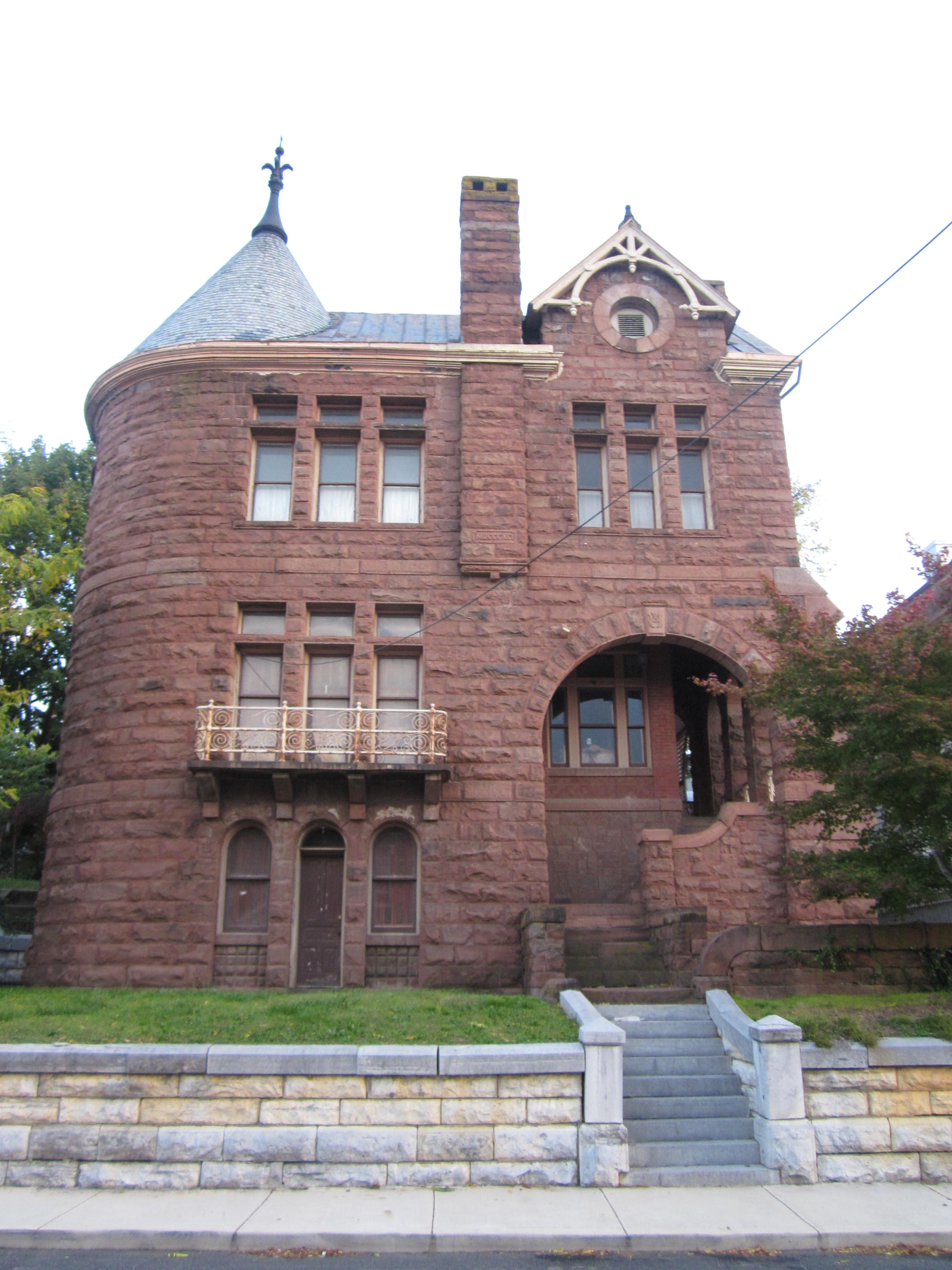 Staunton, Virginia